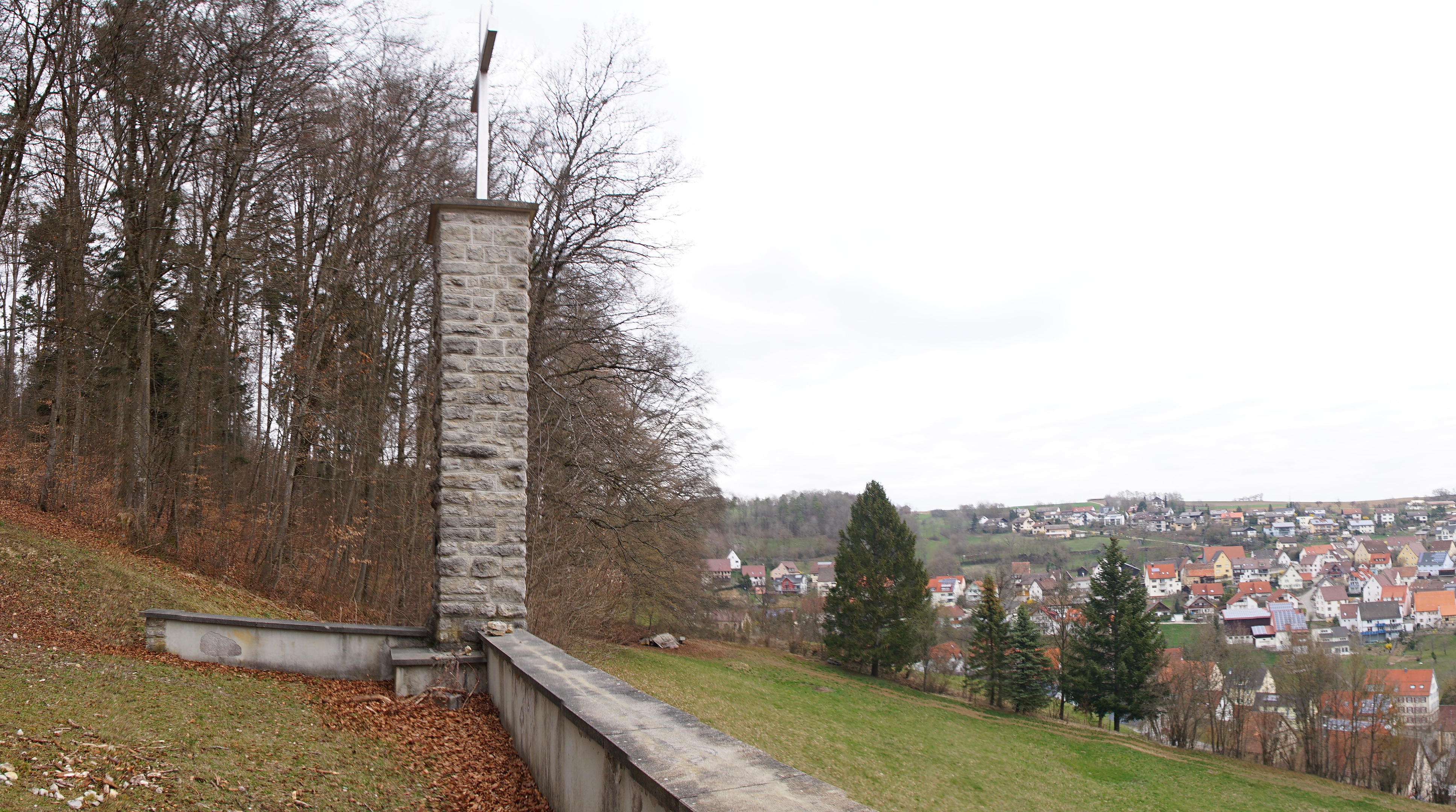 Ansichten von Rexingen (Horb am Neckar)